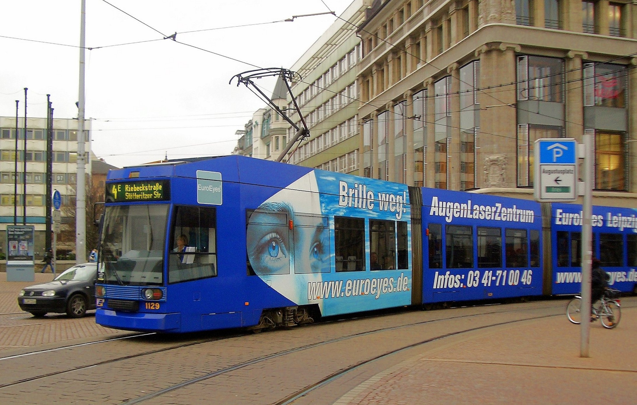 Straßenbahn in Leipzig auf dem Augustusplatz.